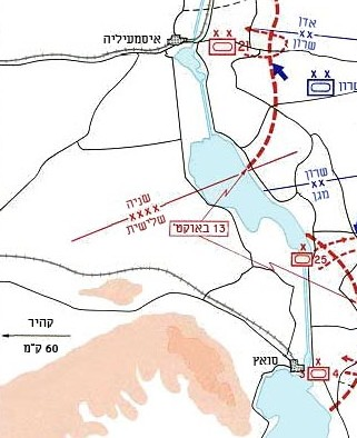 השטח שנכבש על ידי צה"ל בגדה המערבית של תעלת סואץ במלחמת יום הכיפורים